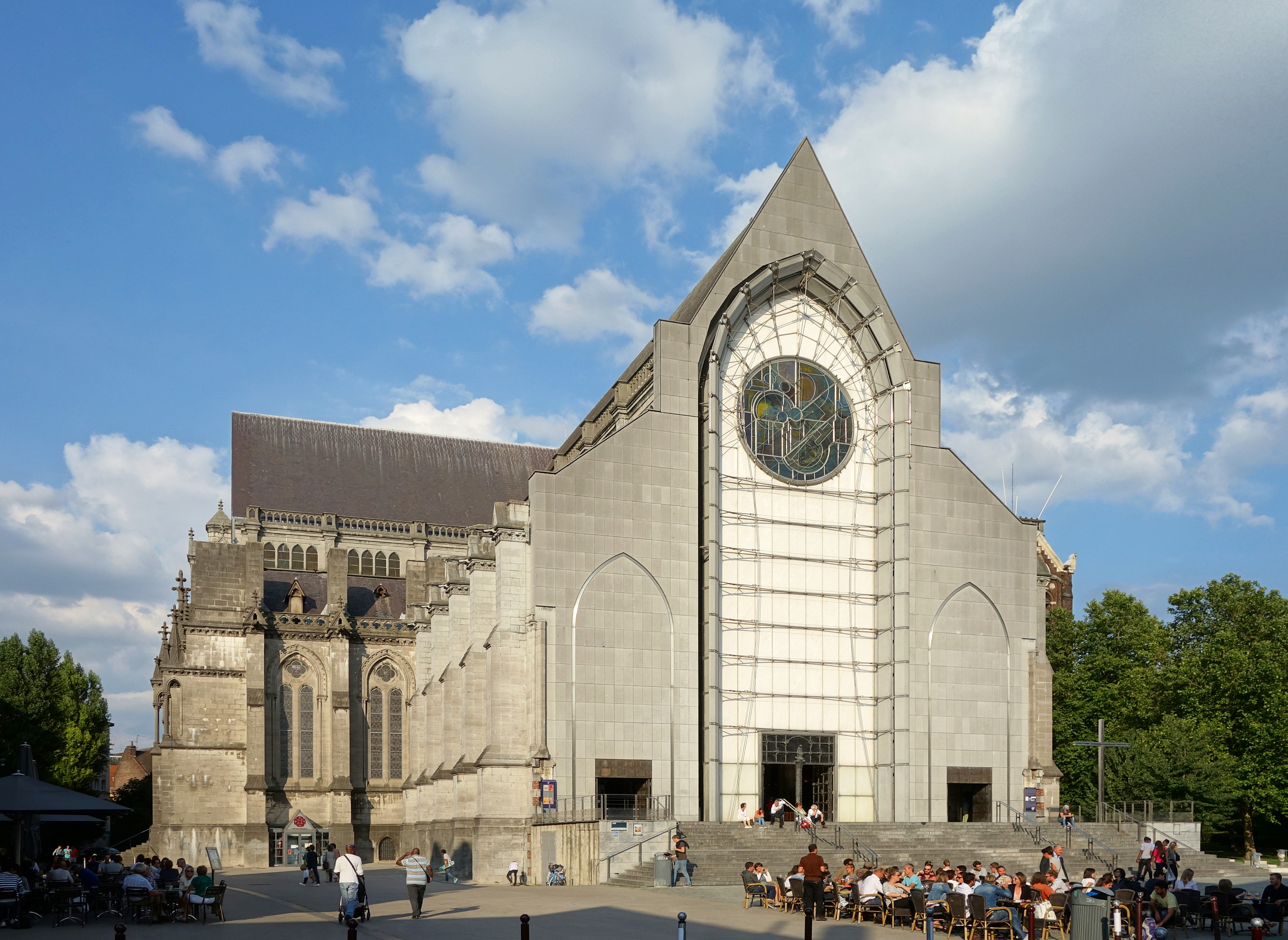 Cathédrale Notre-Dame-de-la-Treille à Lille. .